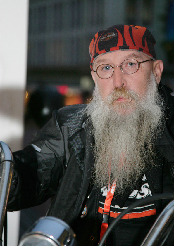 Porträt Roland Reber